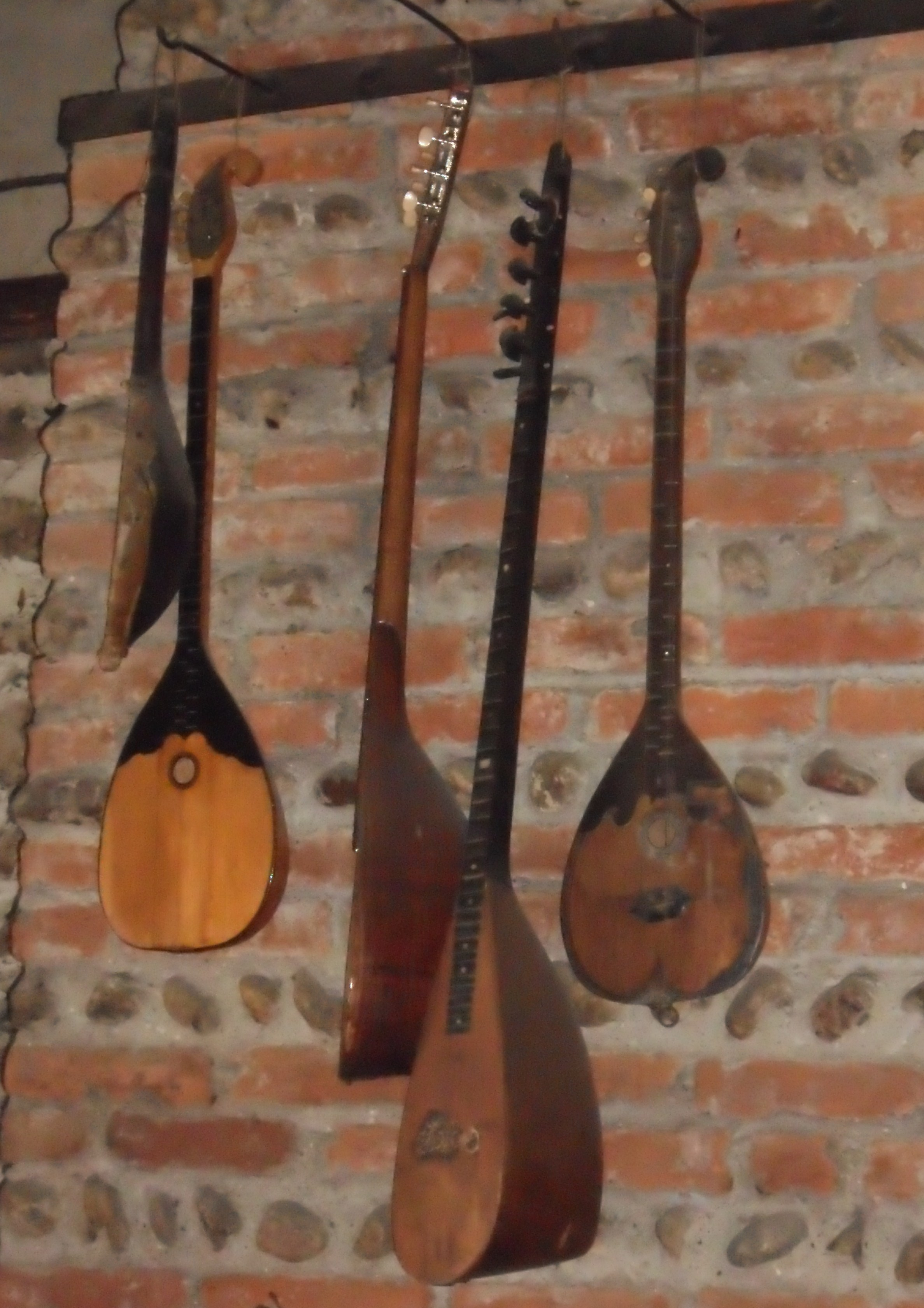 Albanische Musikinstrumente als Wanddekoration